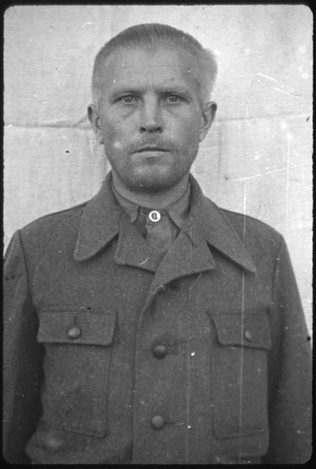 Otto Schulz (* 11. Oktober 1903 in Hirschfeldau; † unbekannt) war SS-Untersturmführer und Betriebsleiter der Deutschen Ausrüstungswerke in Dachau. Im Dachau-Hauptprozess wurde Schulz zum Tode verurteilt, das Urteil später jedoch in 20 Jahre Haft umgewandelt.